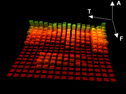 Sonogramme L'image est extraite de l'article situé à la page Le contenu de cet article est publié sous GFDL.